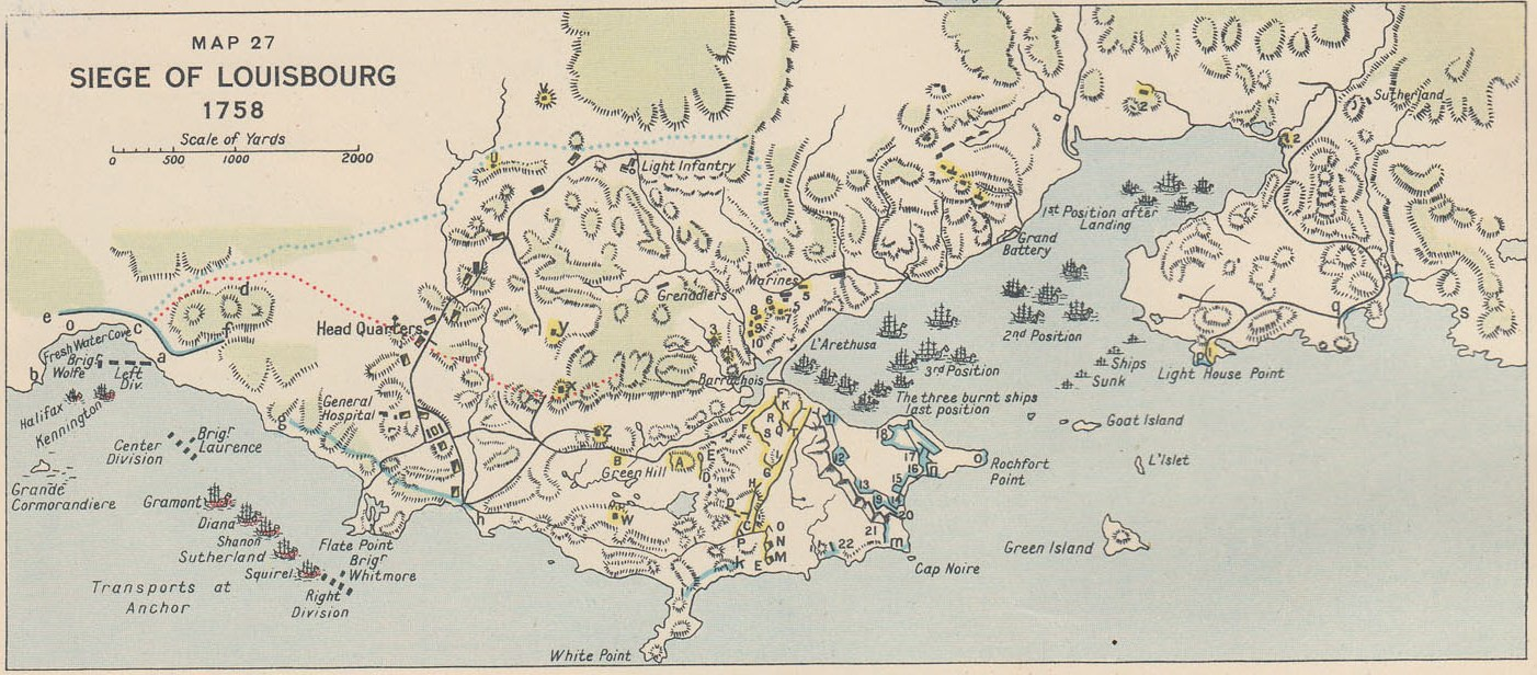 Plan du siège de Louisbourg avec position des vaisseaux lors du siège et des principales positions terrestres.